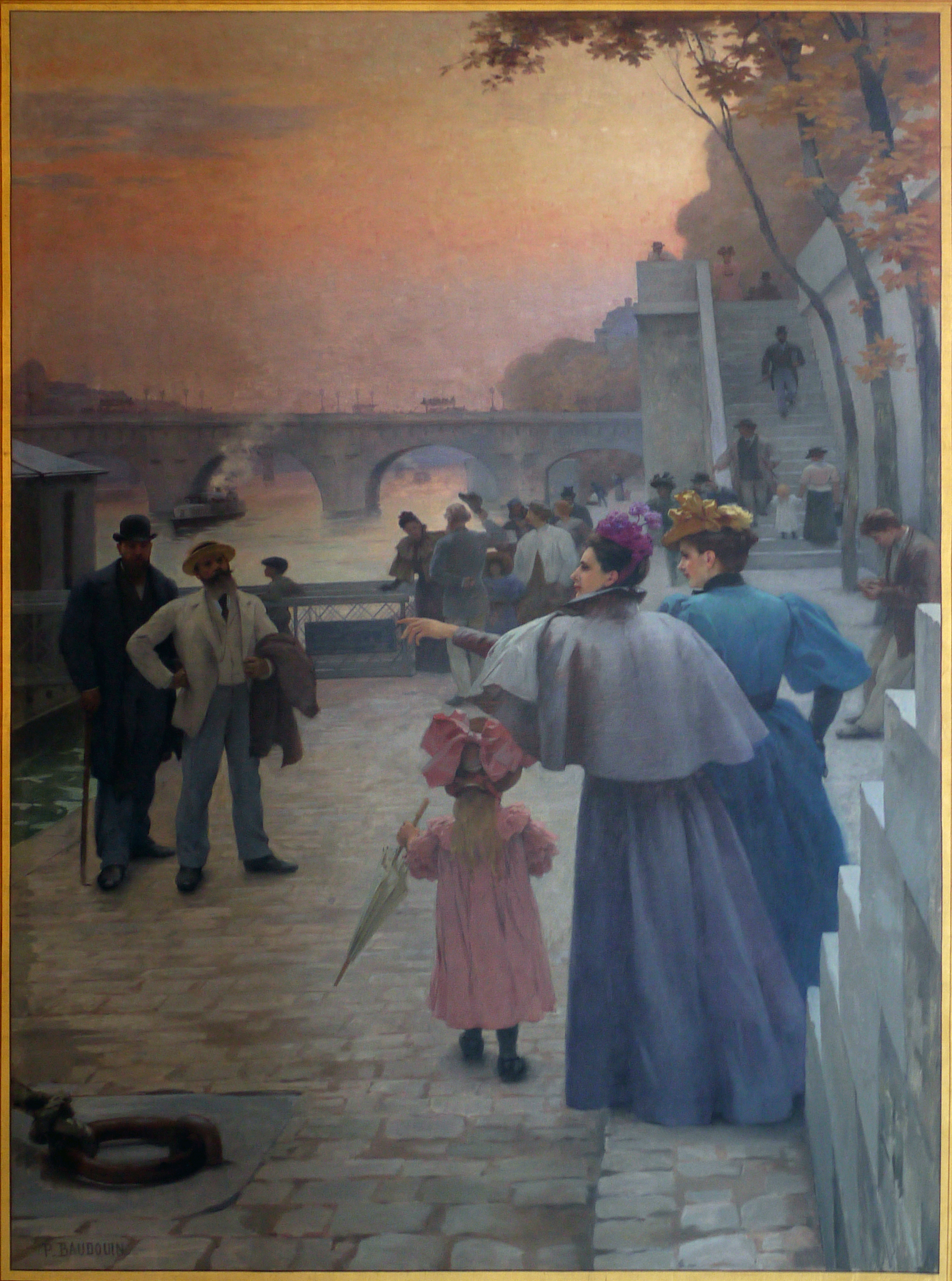 Paul-Albert Baudoüin, Le soir à Paris